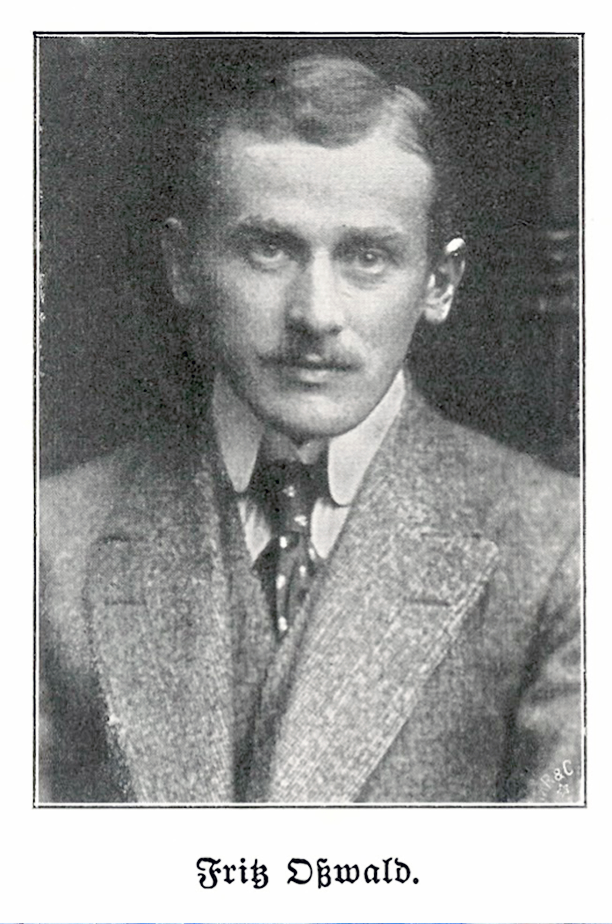 Porträt von Fritz Osswald, * 23. Juni 1878 in Zürich; † 24. August 1966 in Starnberg